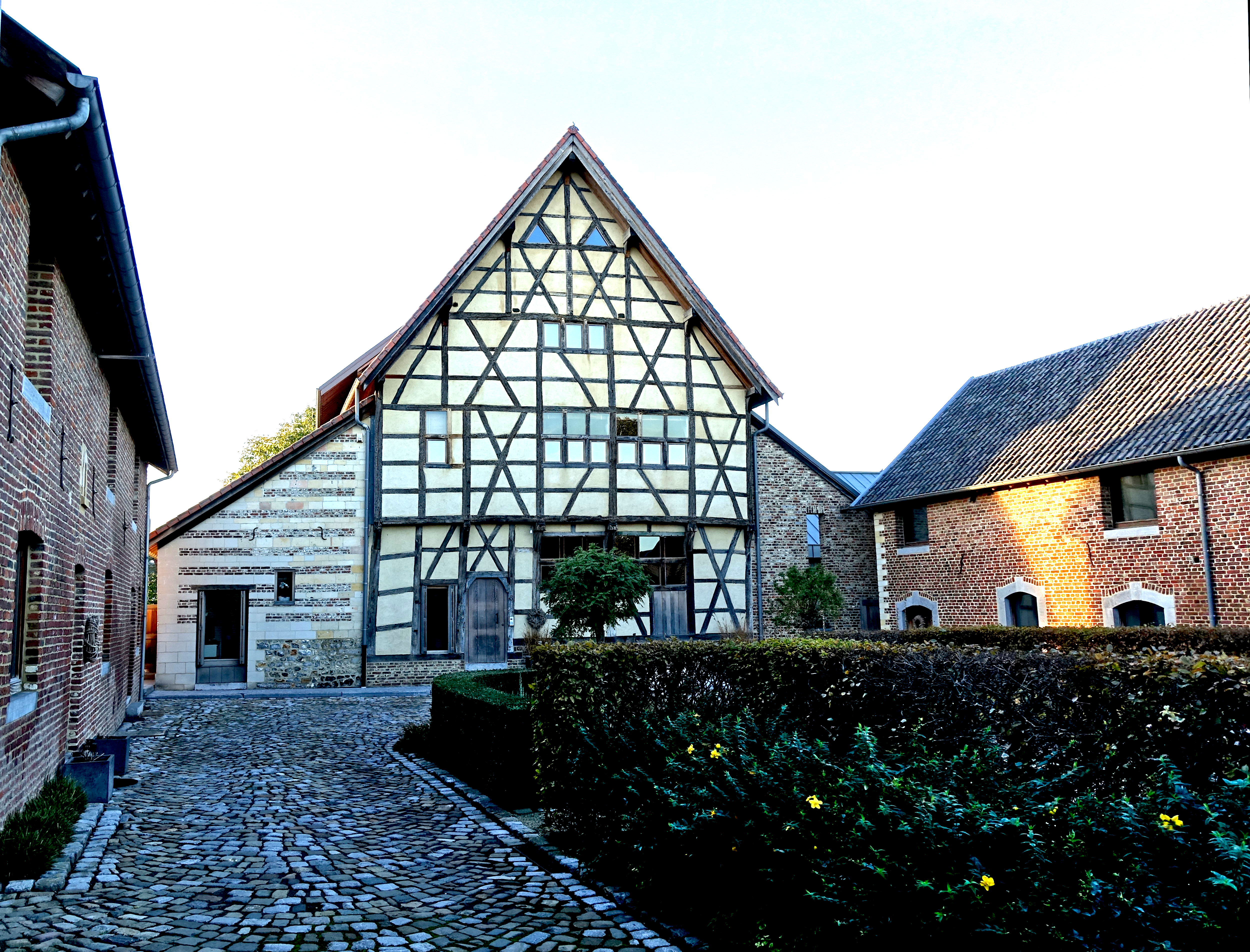 Hof van Eggertingen is een hoeve met oorsprong in de 13de eeuw met middeleeuwse woontoren en vakwerkwoning. This photo of immovable heritage has been taken in the Flemish Region